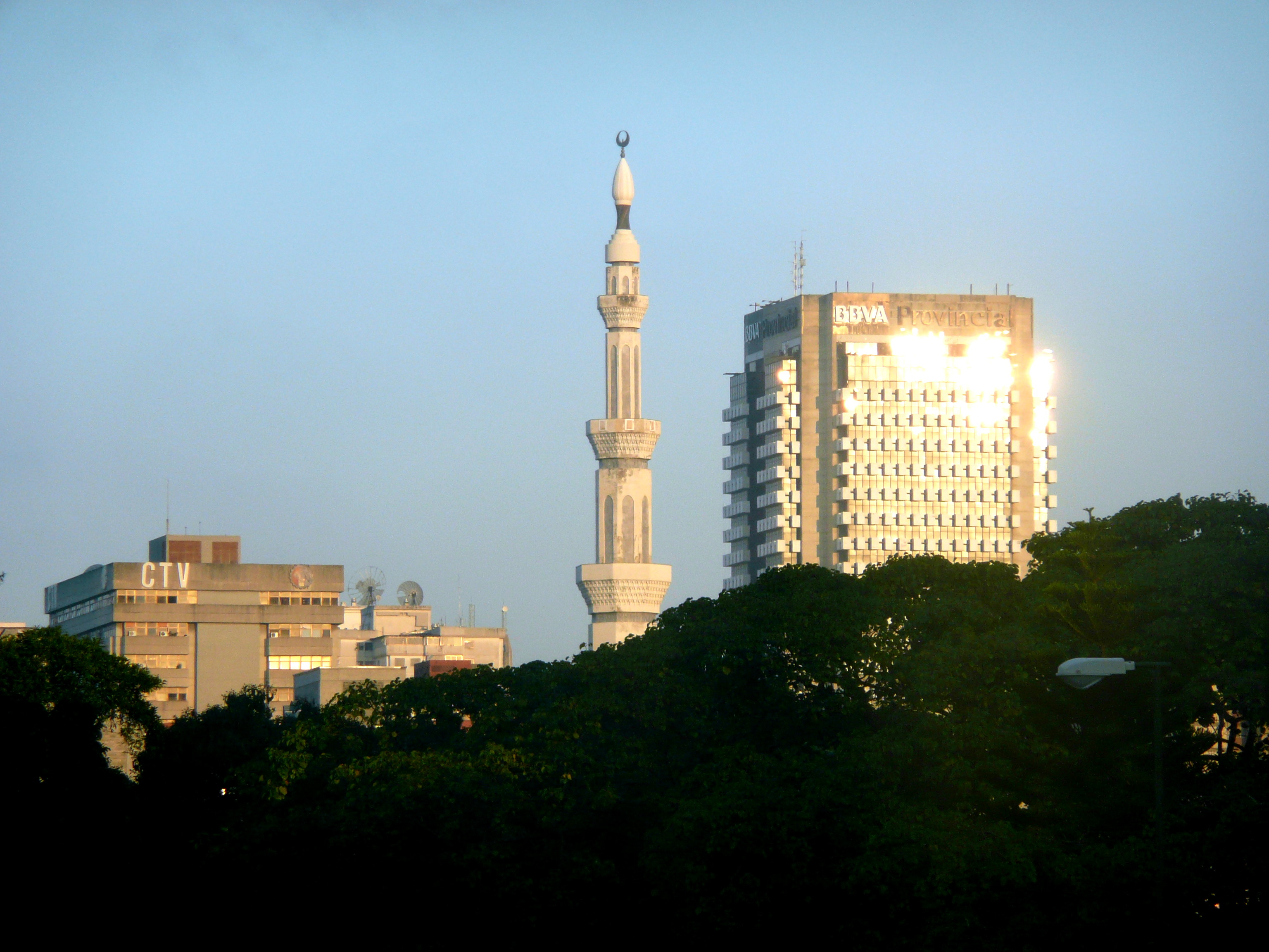 Mezquita de Caracas